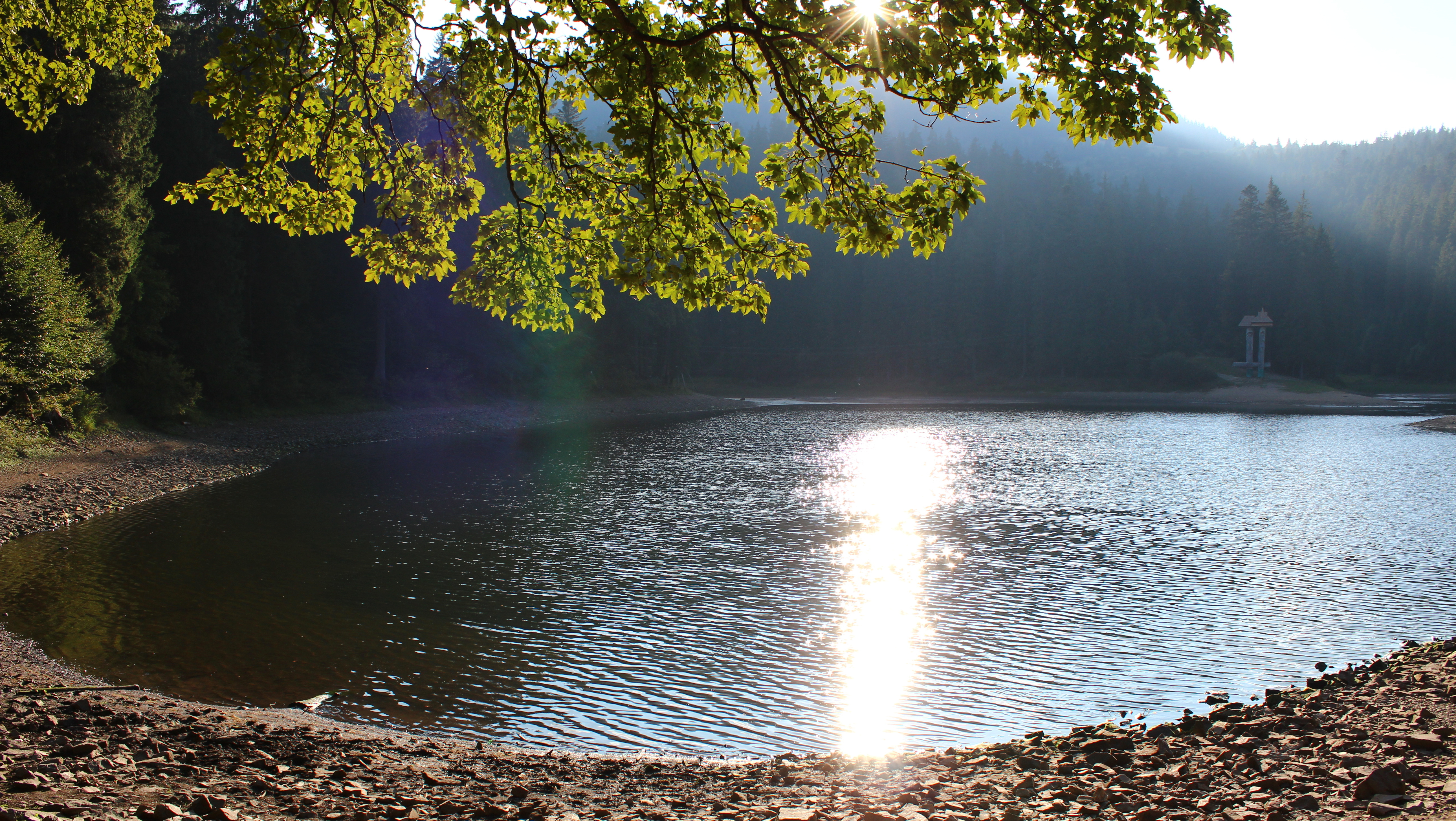 Синевирське озеро